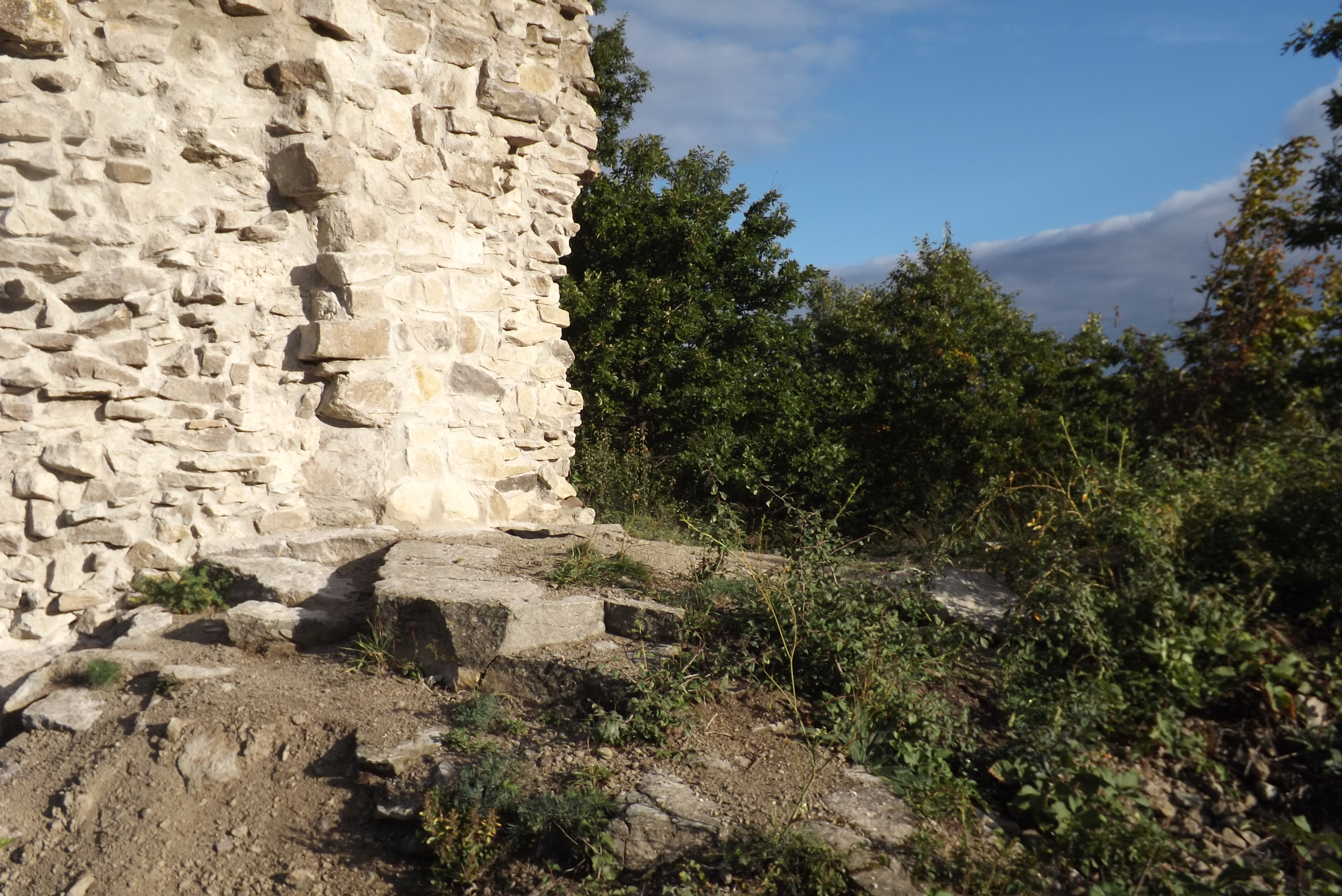 Latorvár, Sály